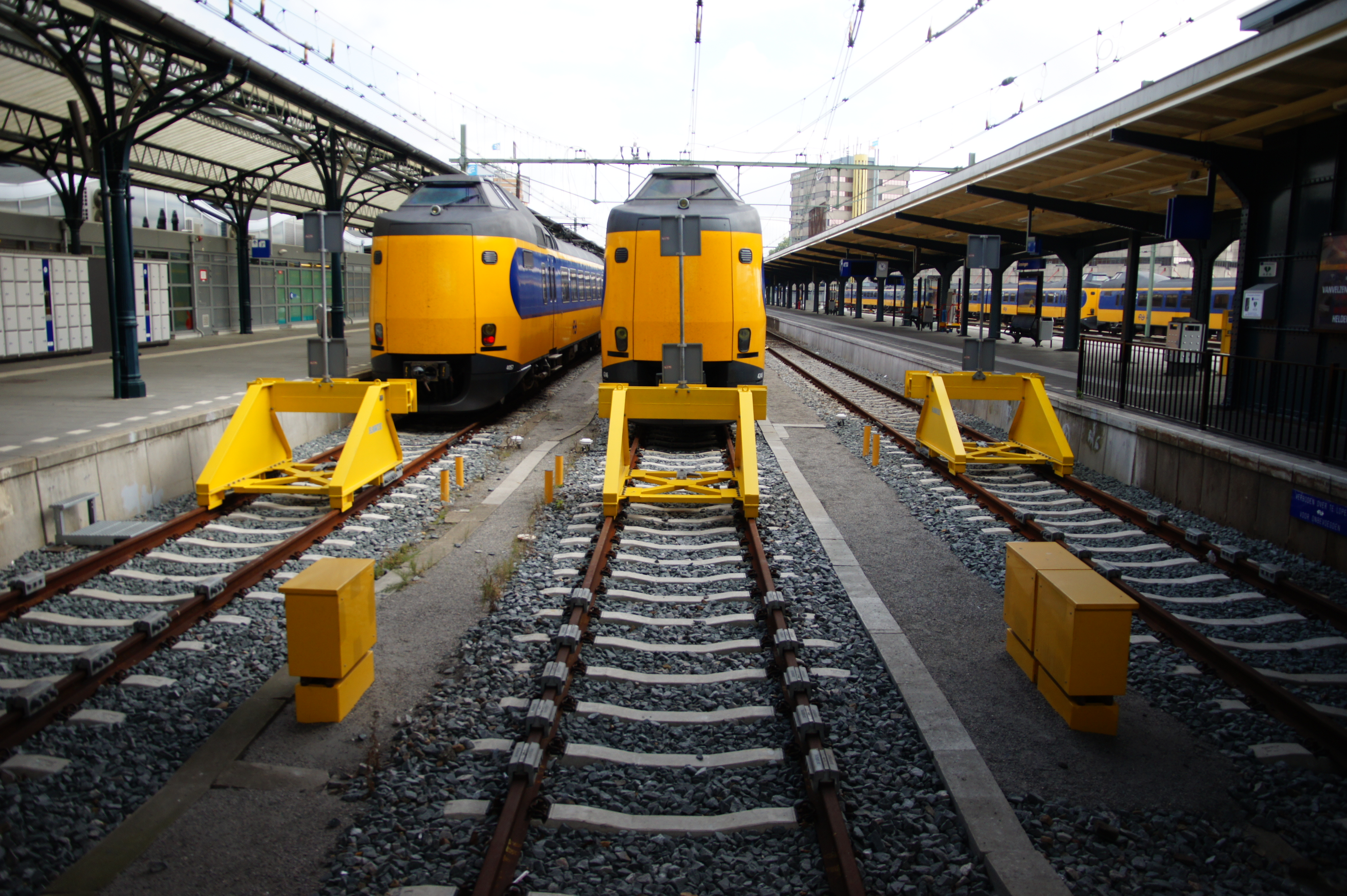 Kopsporen op station Groningen